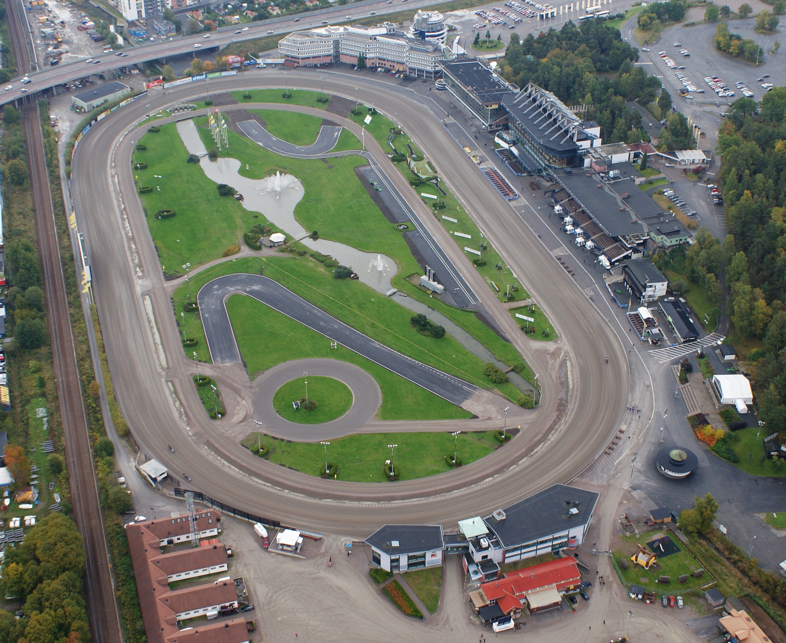 Solvalla sedd från helikopter.